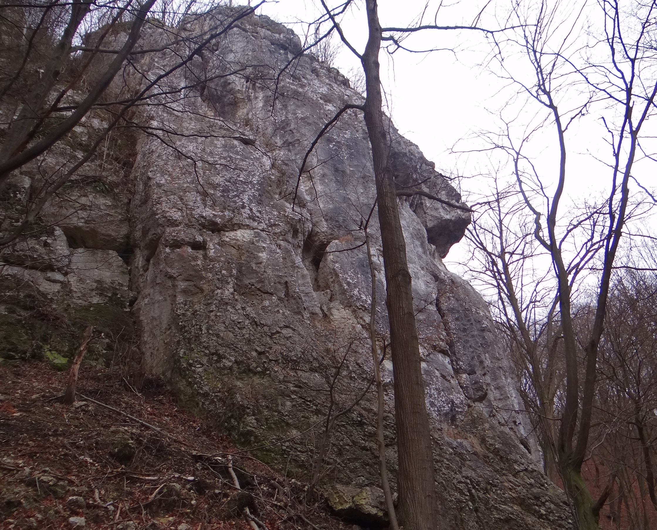 Leśna Baszta w Dolinie Kluczwody